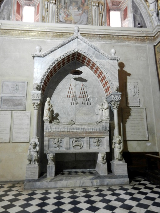 Bergamo - Tomba del cardinale Guglielmo Longo degli Alessandrini, realizzata da Ugo da Campione (1330) nella Basilica di S. Maria Maggiore